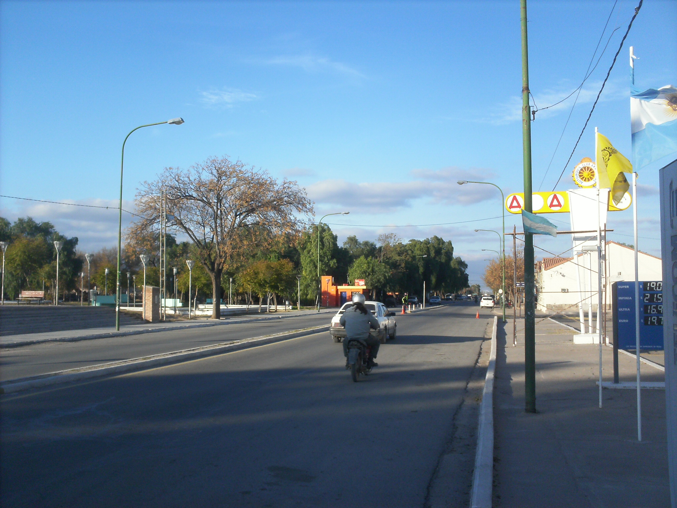 entrada a la localidad por la ruta